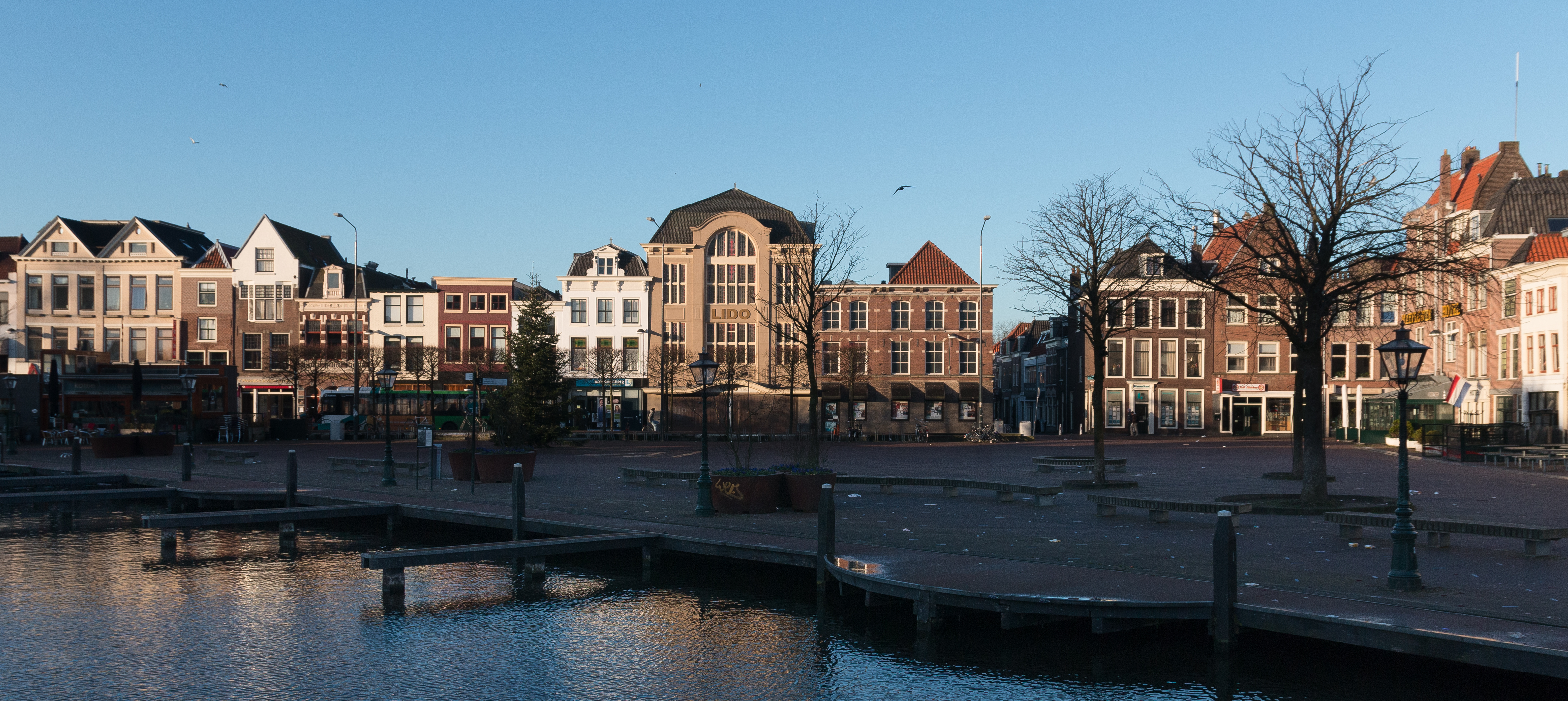 Leiden, Steenstraat en Beestenmarkt